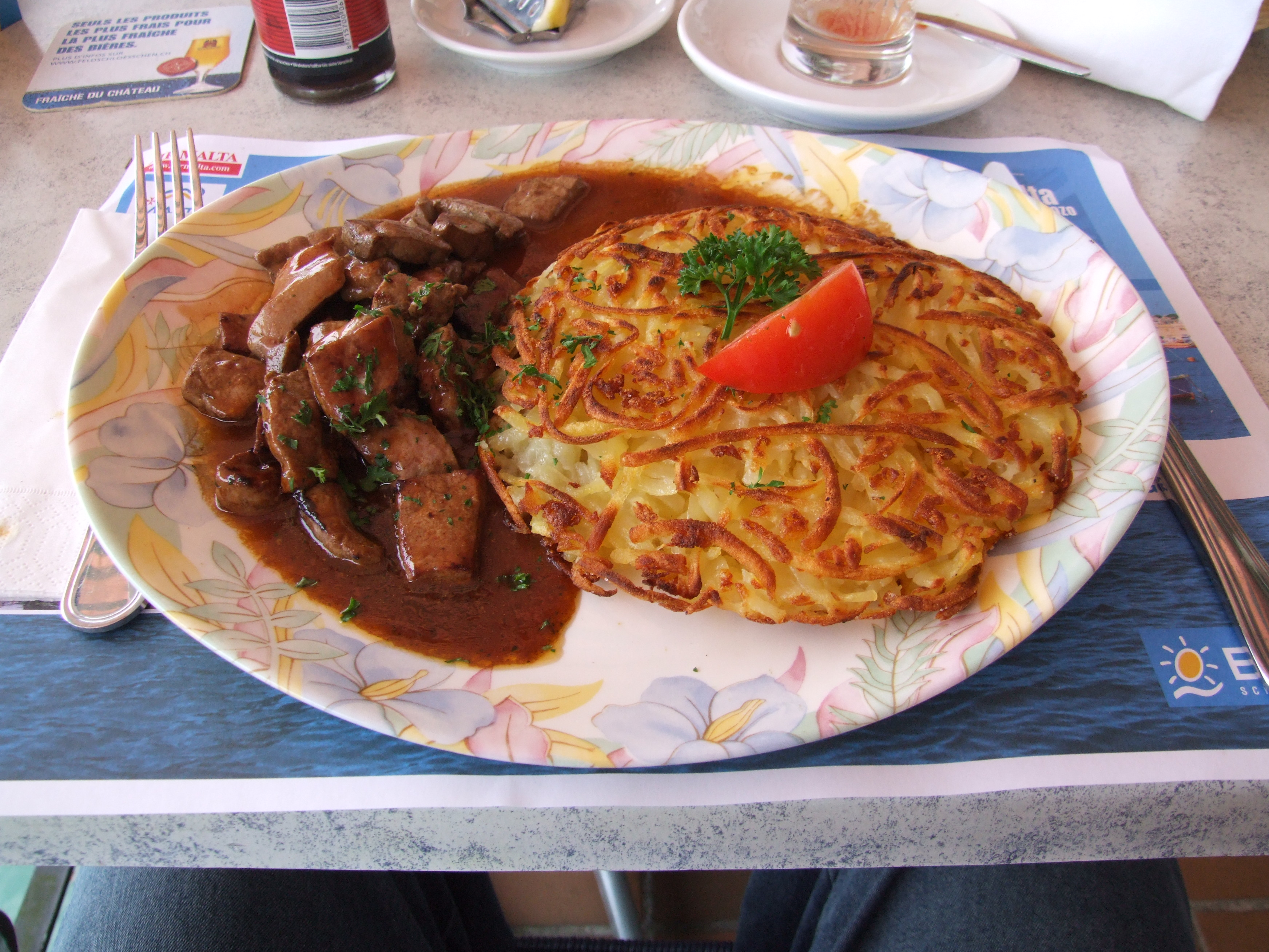 Leberli mit Rösti, Schweizer Spezialtät, serviert in Rheinfelden